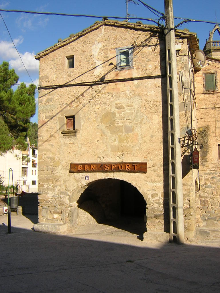 Sant Joan Baptista de Monistrol de Calders (Monistrol de Calders, Moianès)